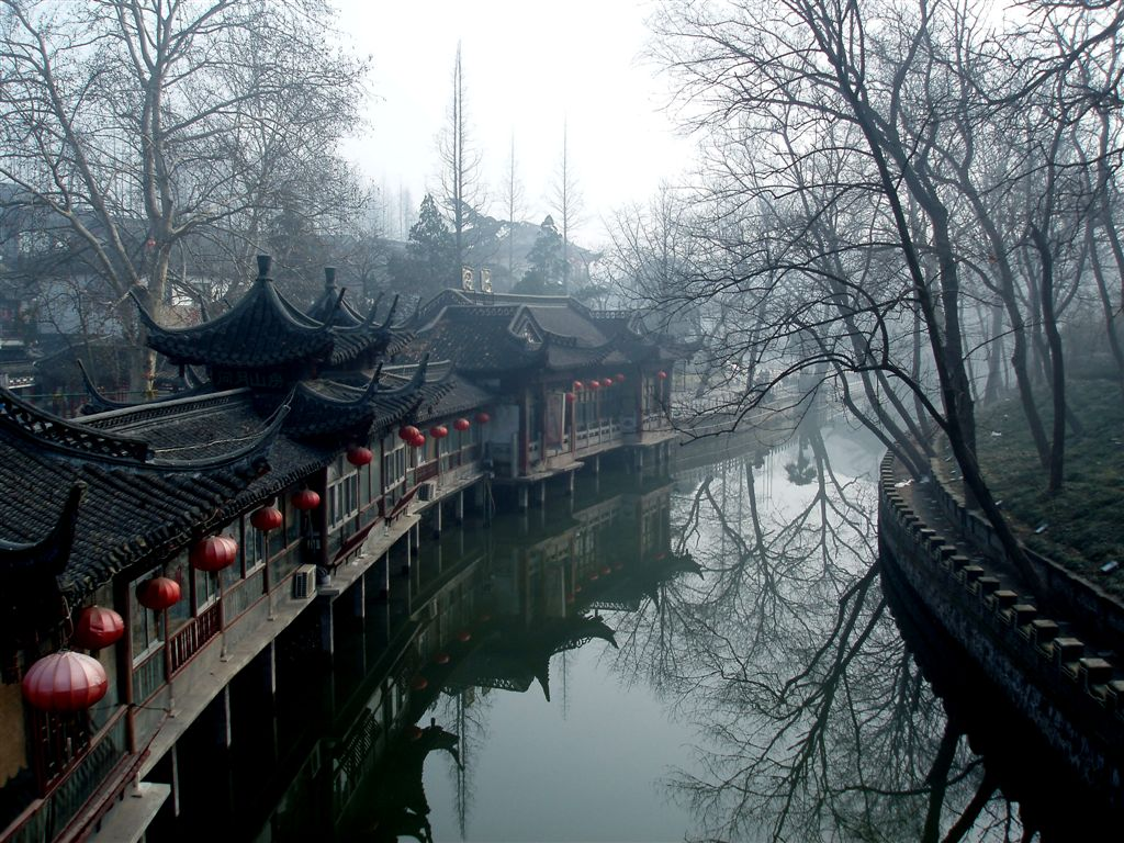 Yangzhou am Morgen